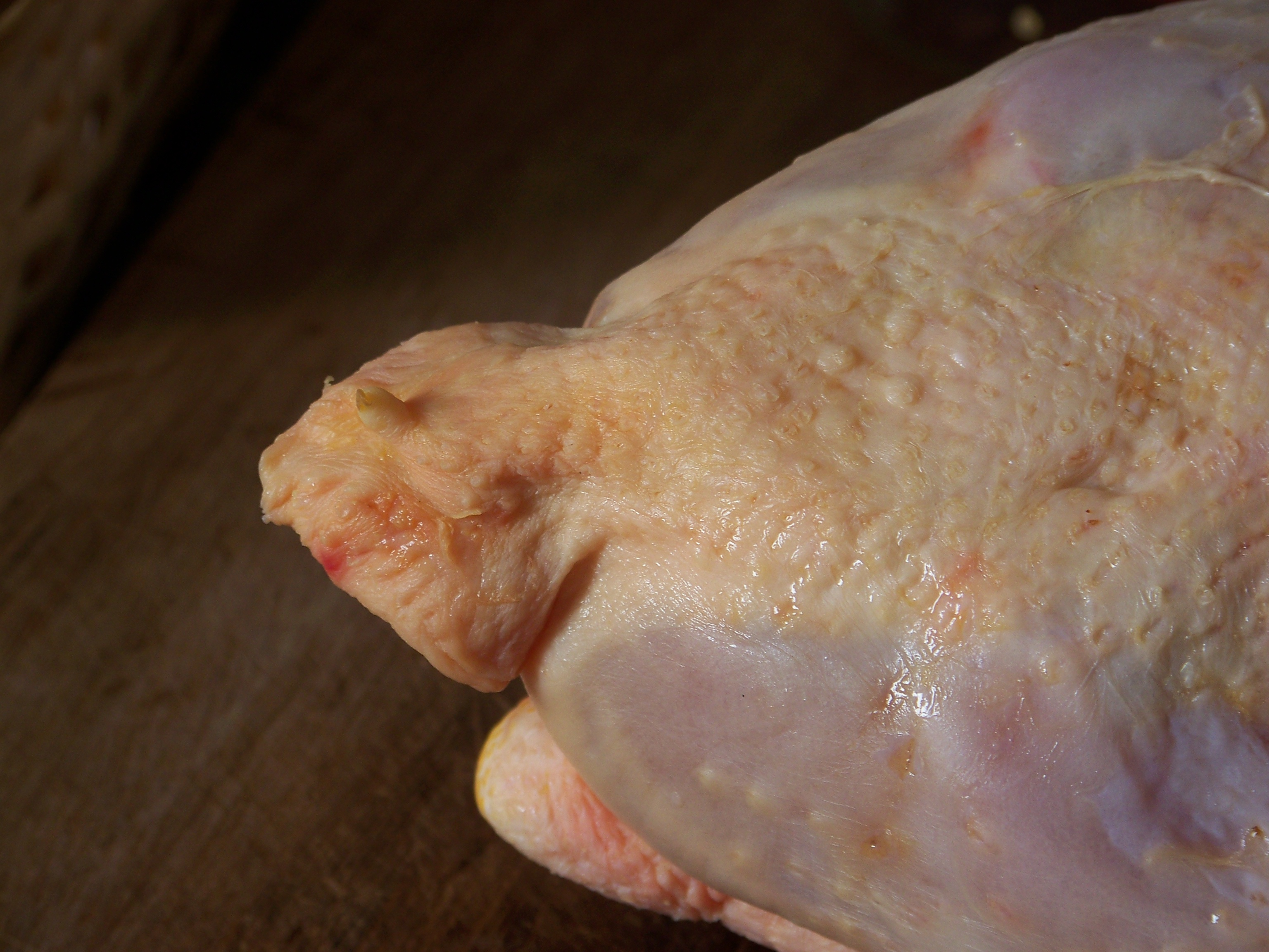 Croupion du poulet avant extraction de la glande uropygienne située sur le dessus et dont la sécrétion sert au volatile à lisser et à imperméabiliser ses plumes.